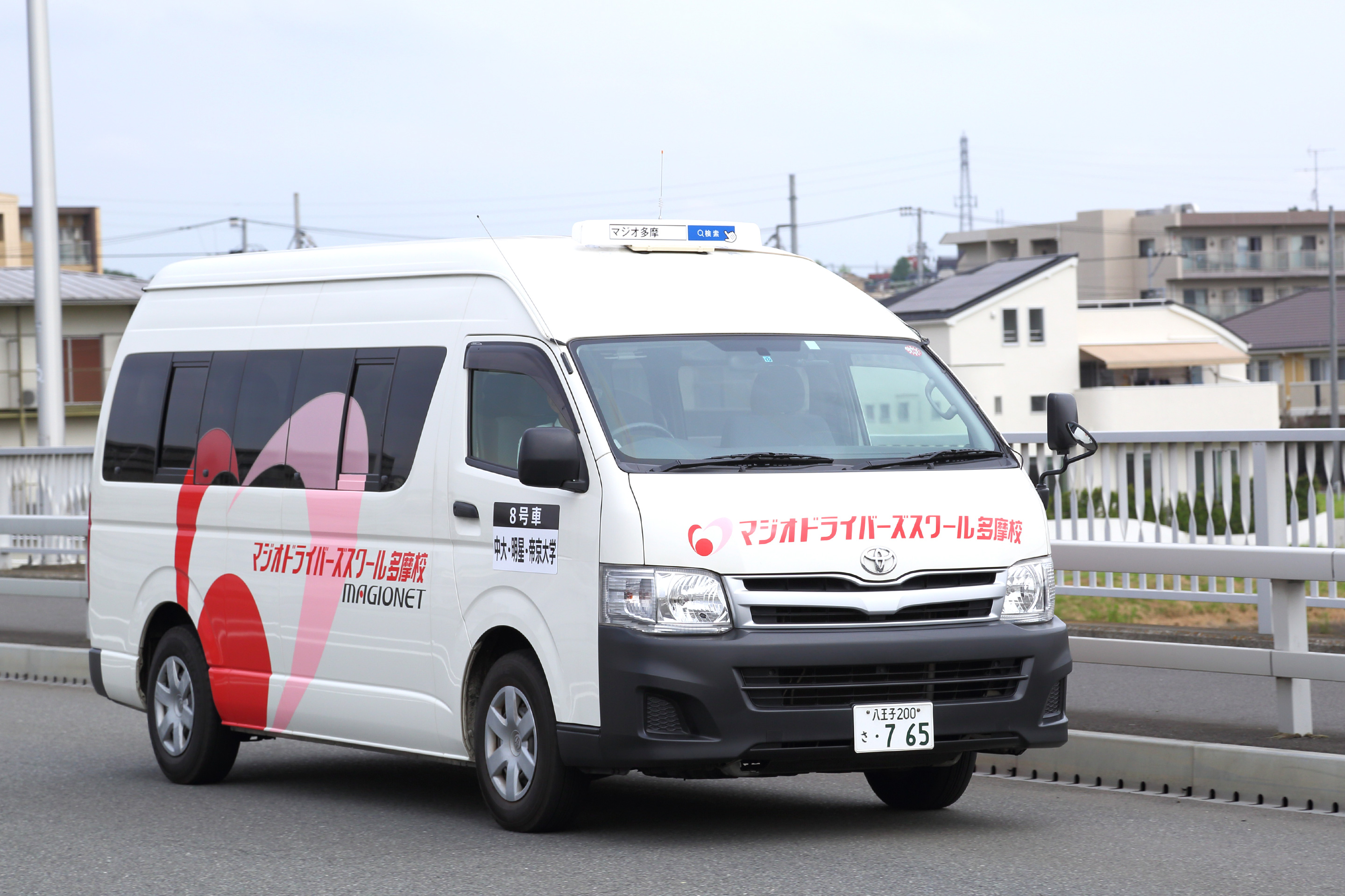 マジオネットによる200系ハイエース（中期型・ワイドボディ）の送迎車。